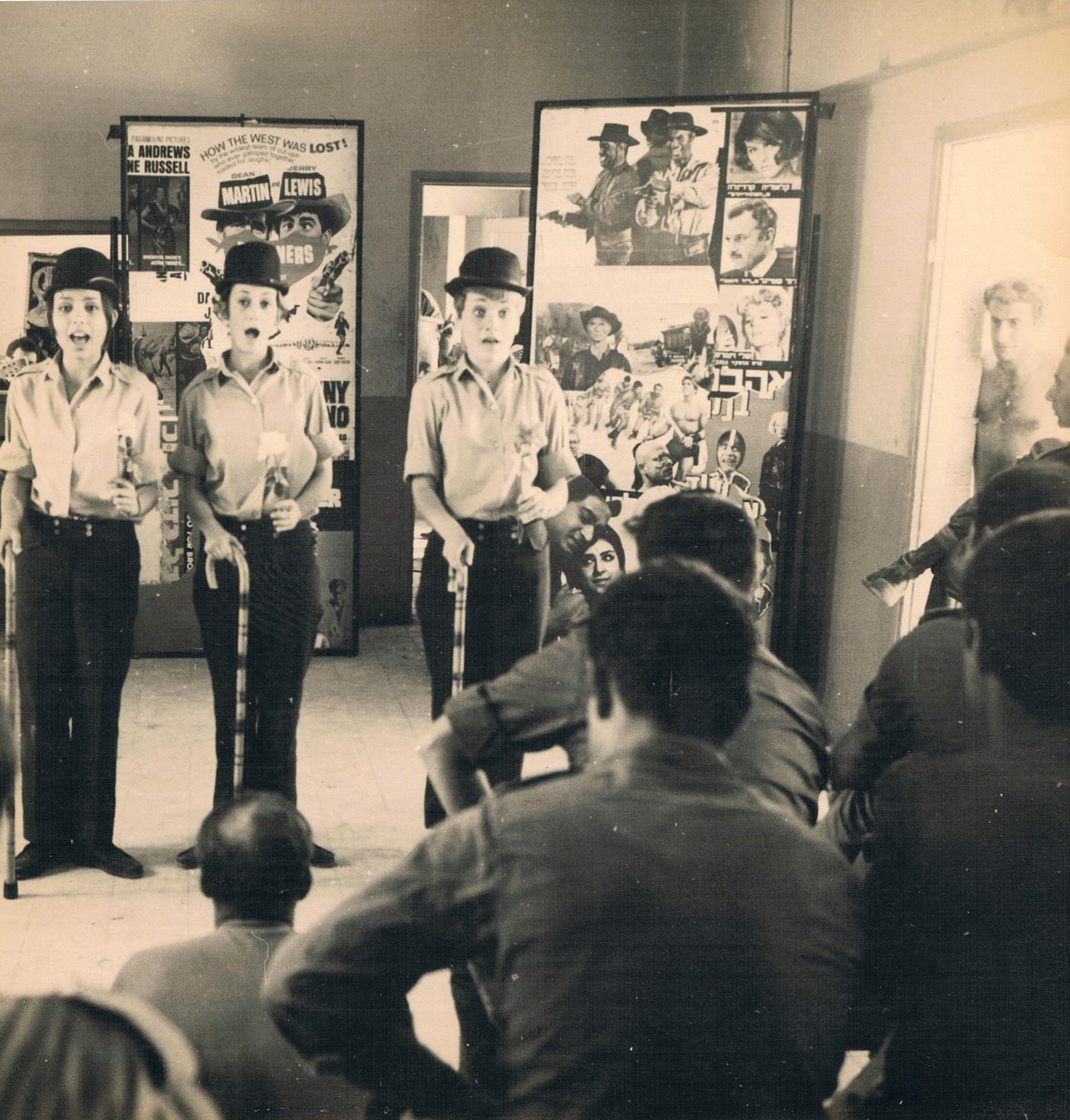 גליה ישי, אפרת לביא וניצה שאול בשיר "צ'רלי צ'אפלין"